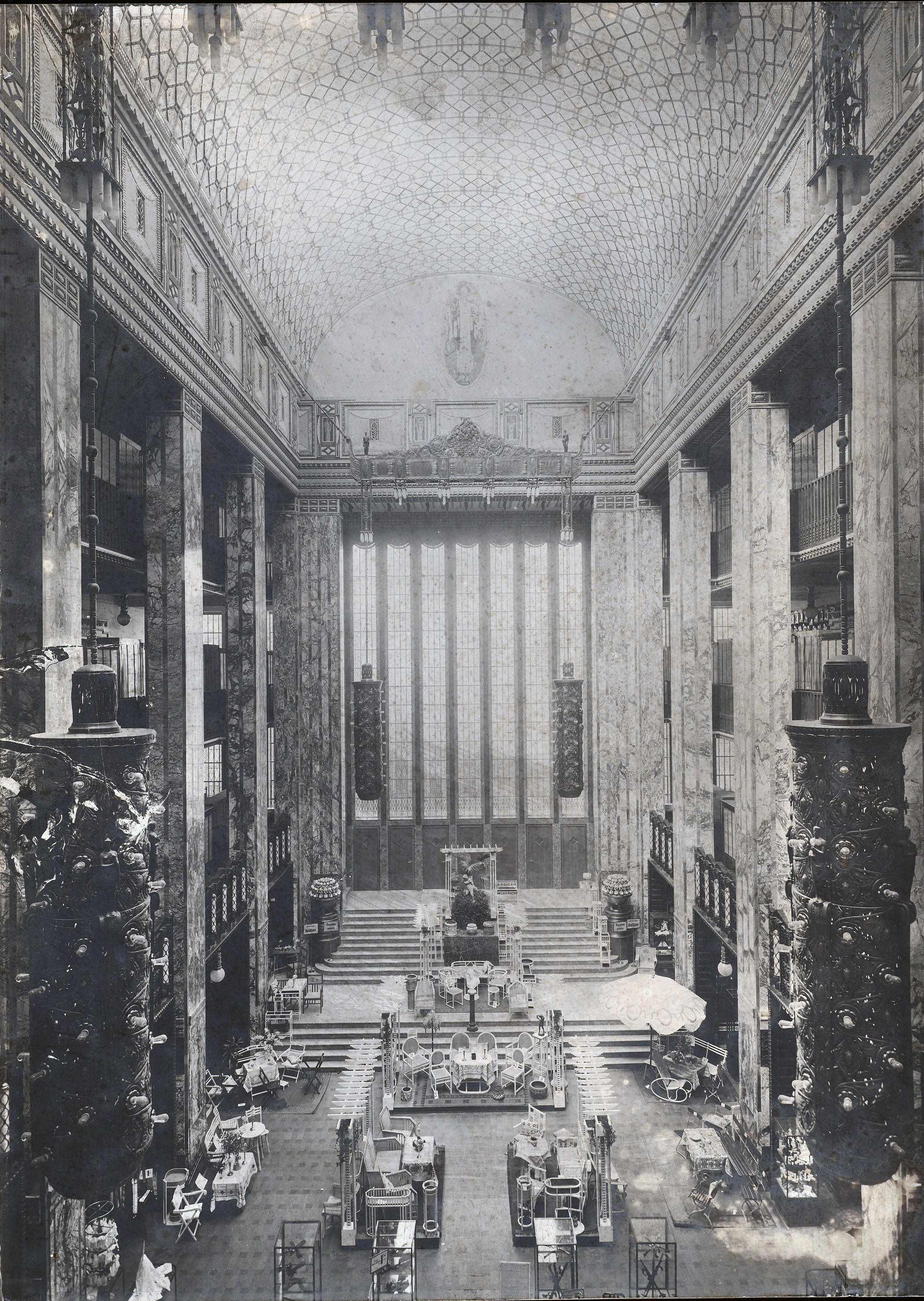 Olbrich Joseph Maria (1867–1908), Warenhaus Leonhard Tietz AG, Düsseldorf: Ansicht des überdachten Lichthofes des Warenhauses Leonh. Tietz in Düsseldorf. Foto auf Karton, 64,7 x 47,1 cm (inkl. Scanrand). Architekturmuseum der Technischen Universität Berlin Inv. Nr. F 9719.